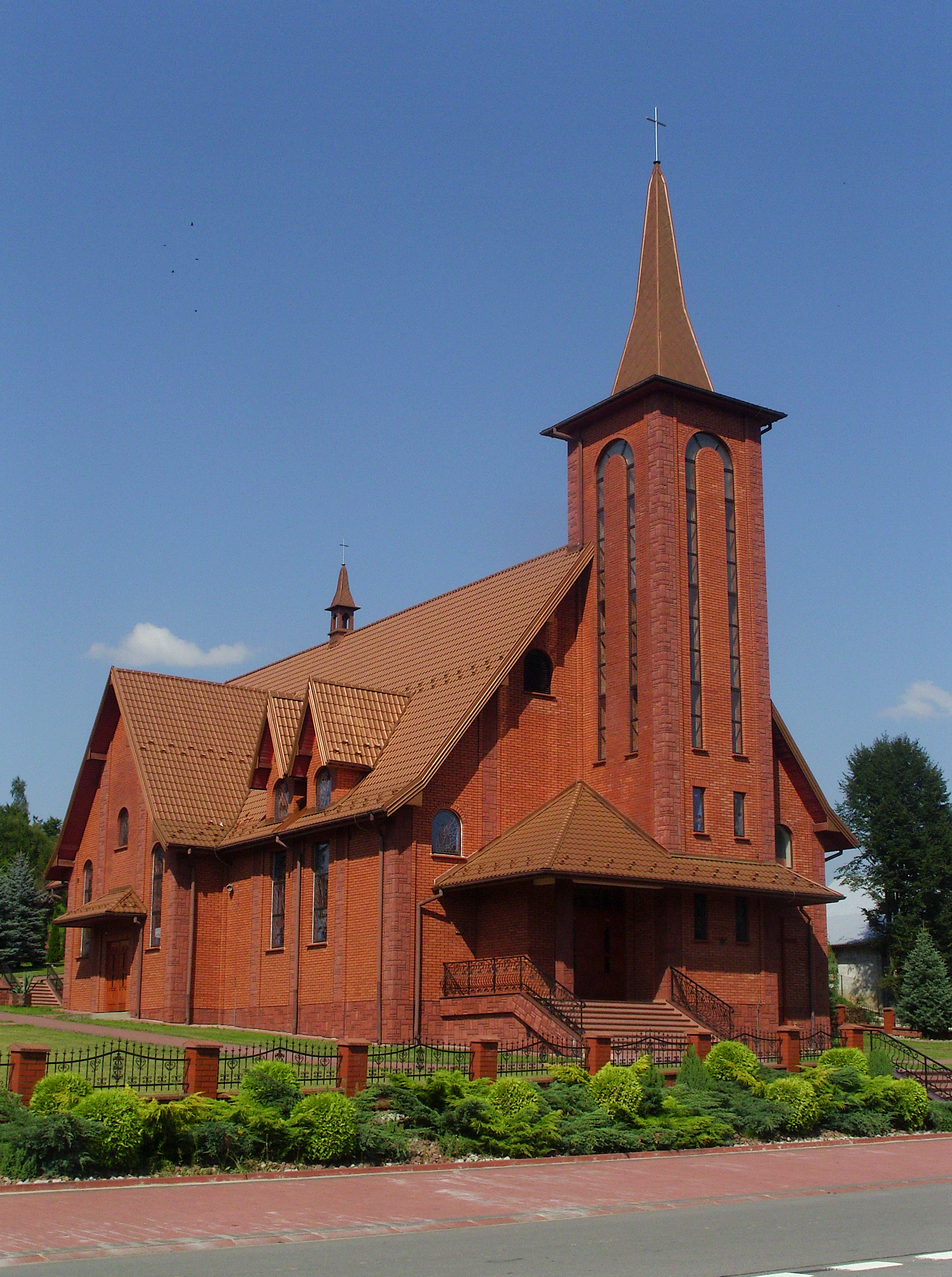 Kościół parafialny Najświętszej Maryi Panny Królowej w Jabłonicy koło Jasła, miejscowości wchodzącej do 2003 roku w skład parafii Imienia Maryi w Bączalu Dolnym